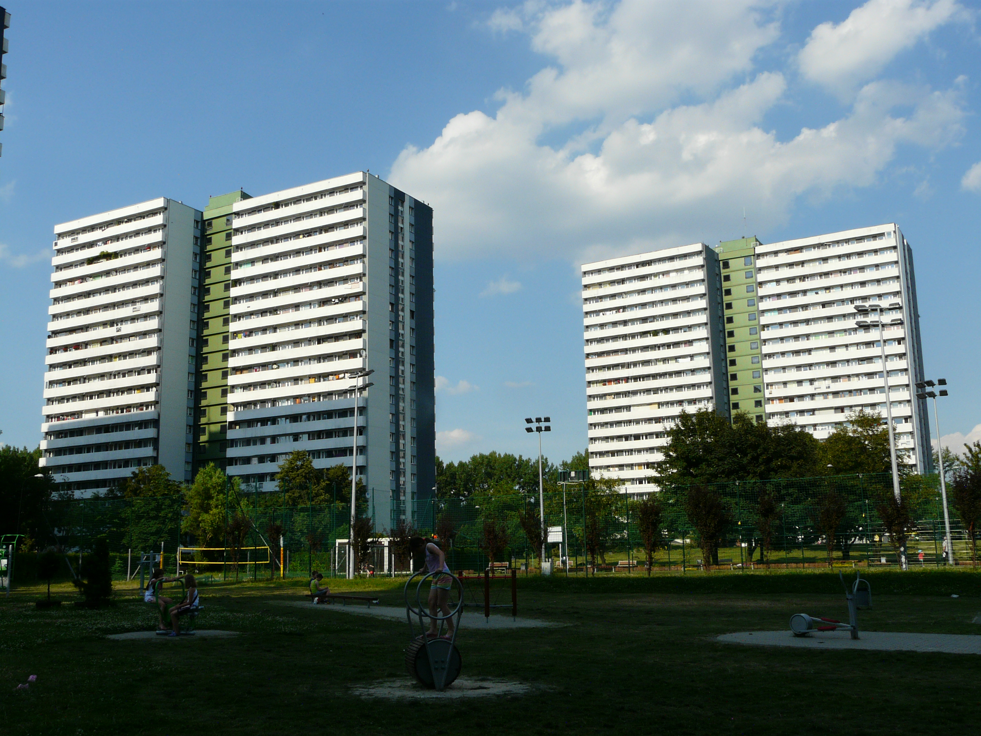 Bloki mieszkalne przy ul. Ułańskiej w Katowicach.